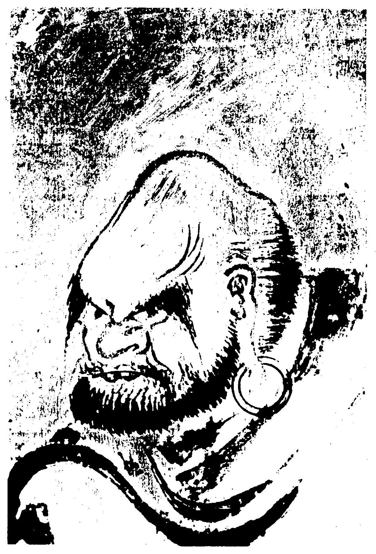 Mijamoto Musaši: Daruma (Bódhidharma)